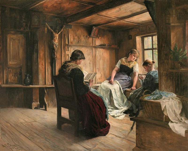 In der Bauernstube